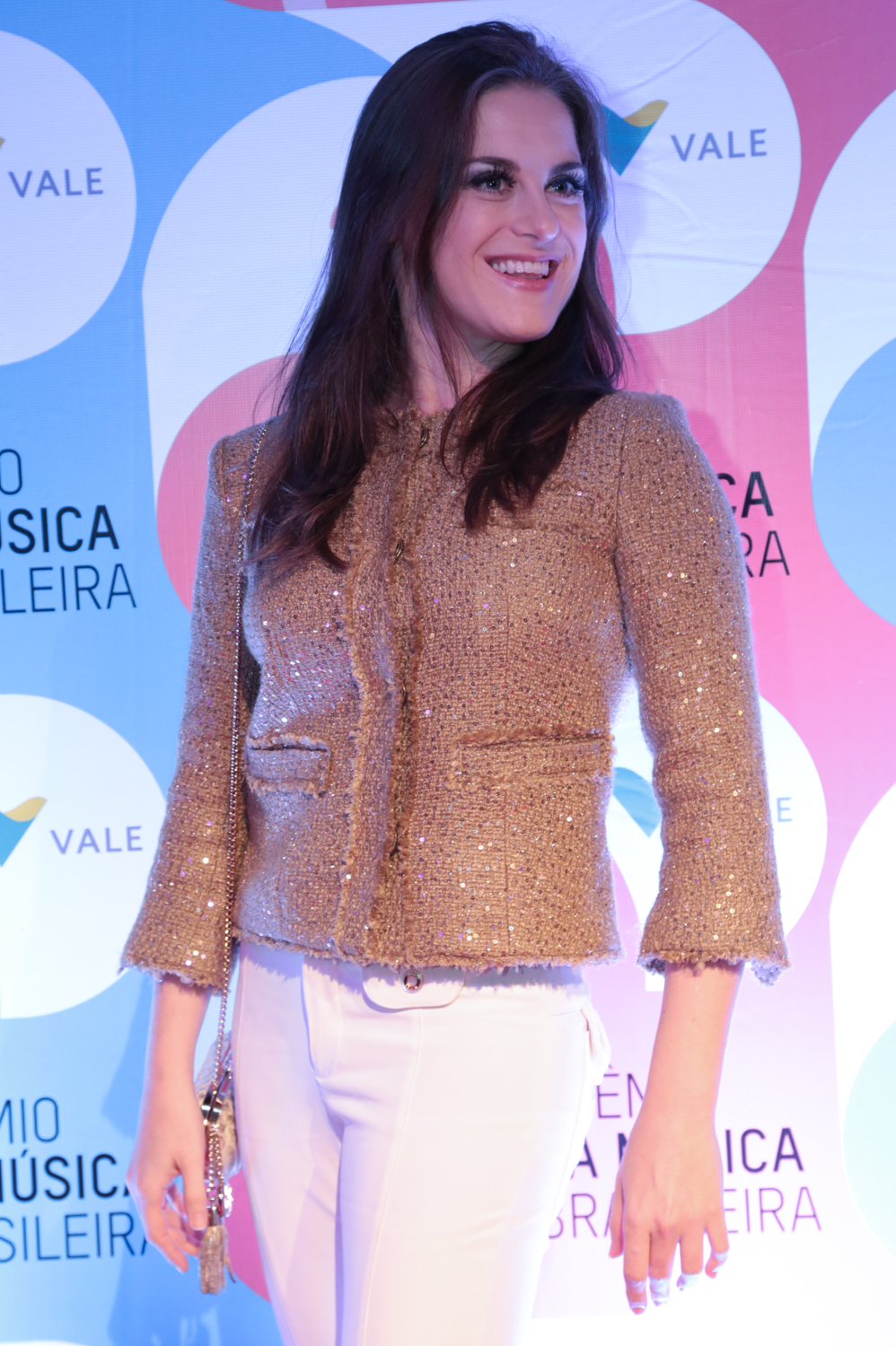 Alessandra Maestrini durante o 25º Prêmio da Música Brasileira no Theatro Municipal. Foto: Reginaldo Teixeira (14/05/14)